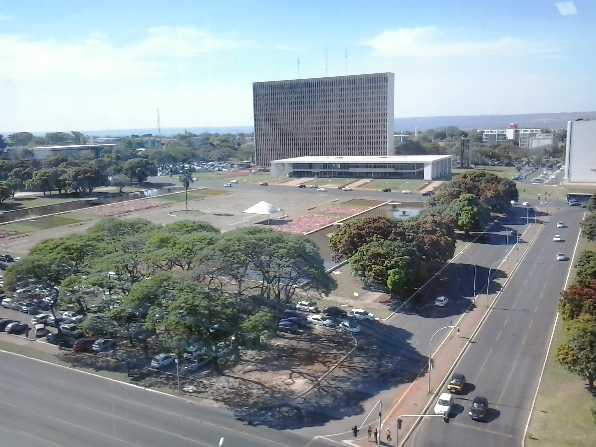 Em primeiro plano Praça do Buriti, ao fundo Palácio do Buriti, edifício-sede do Governo do Distrito Federal, Brasil.